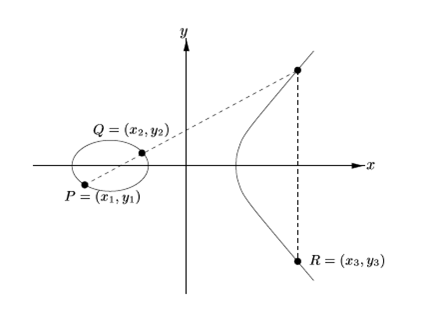 Рис 1.1. Геометрична ілюстрація додавання точок на еліптичній кривій